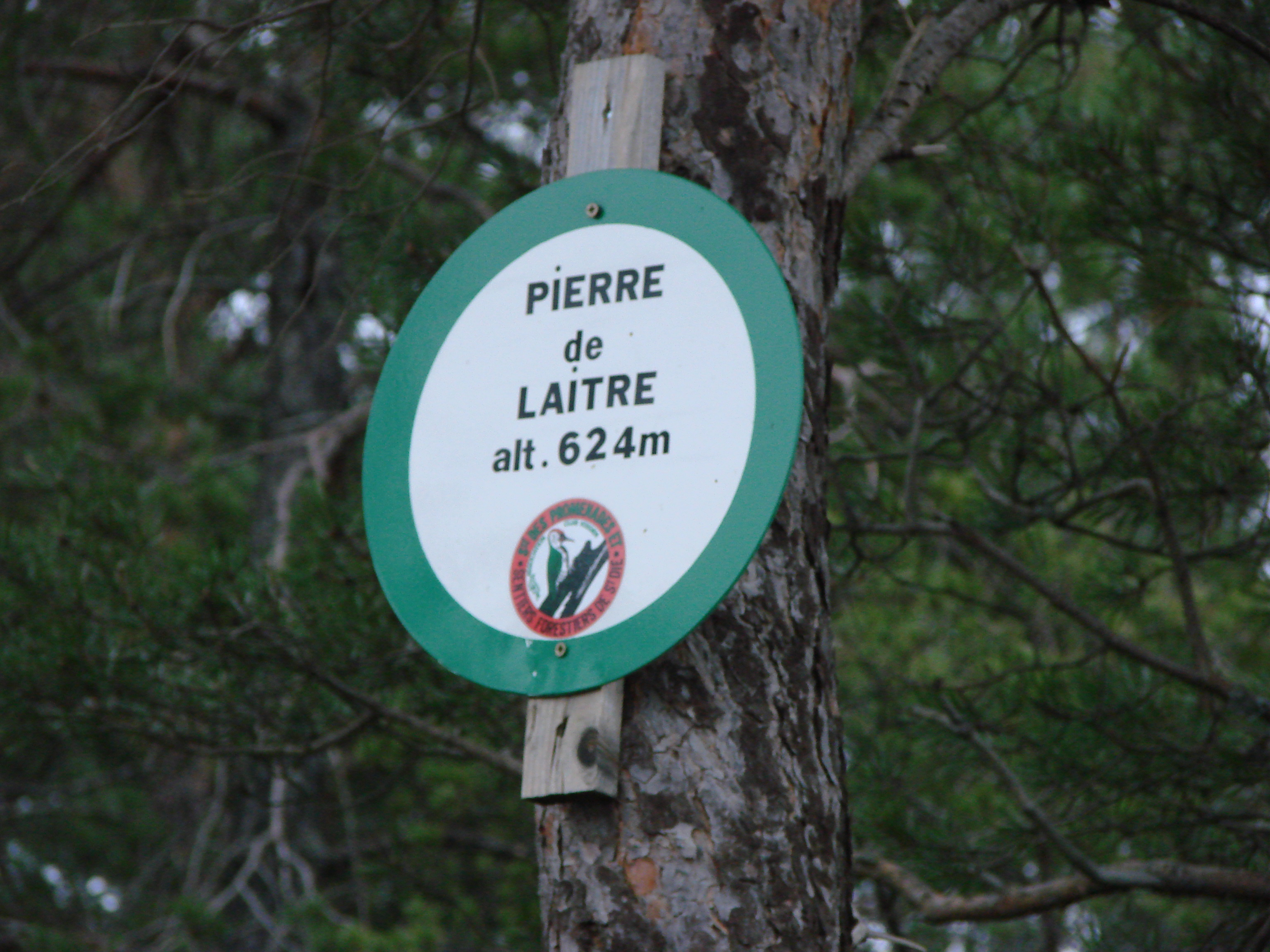 Altitude : 624 mètres at Pierre de Laitre, Vosges, France.